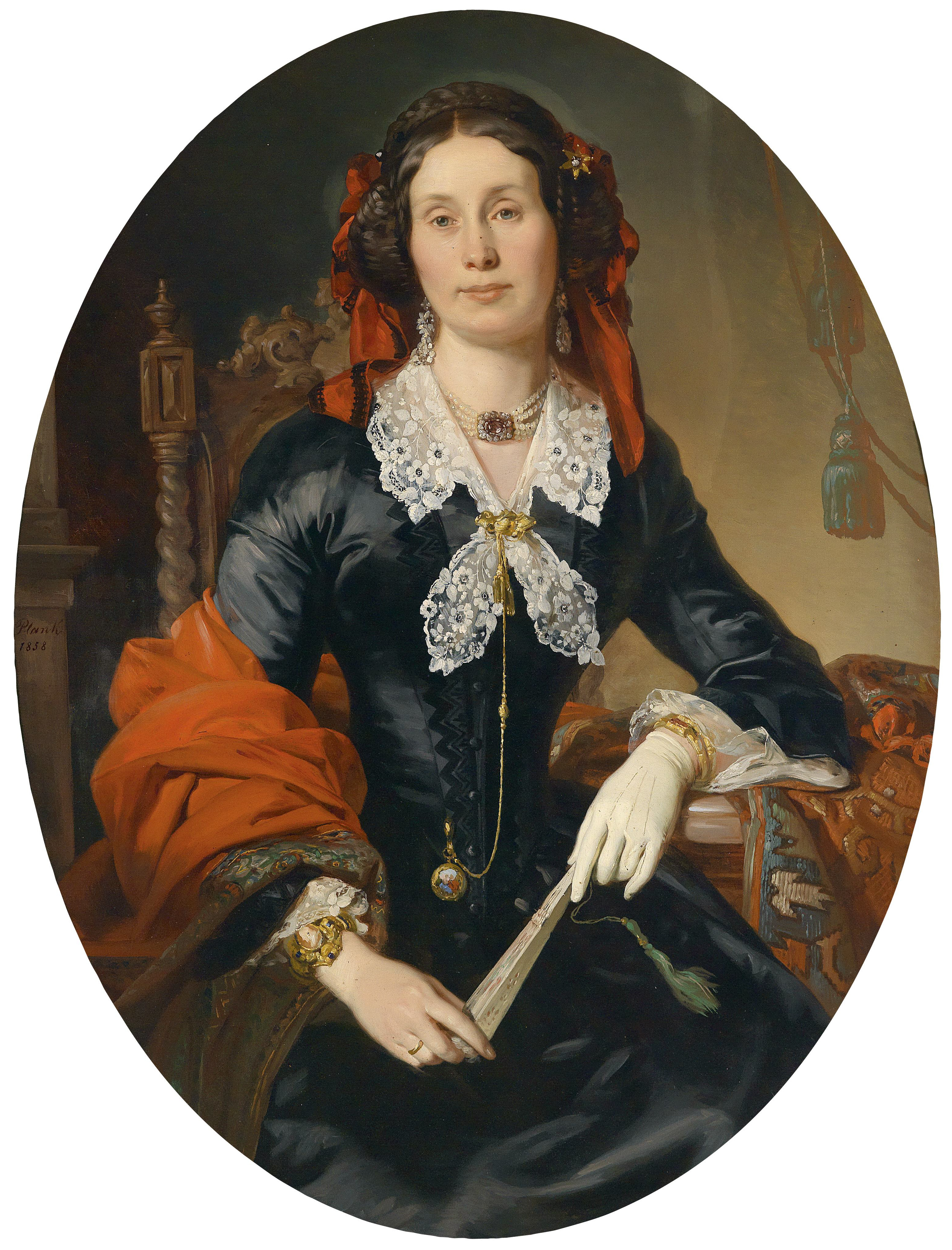 Bildnis Anna Reitter geb. Lorenz (1815-1881) mit rotem Tuch, signiert Jos. Plank 1858, Öl auf Leinwand, 110 x 84 cm Anna und Alois Reitter sind die Großeltern der Anna Sacher (1859-1930) geb. Fuchs.